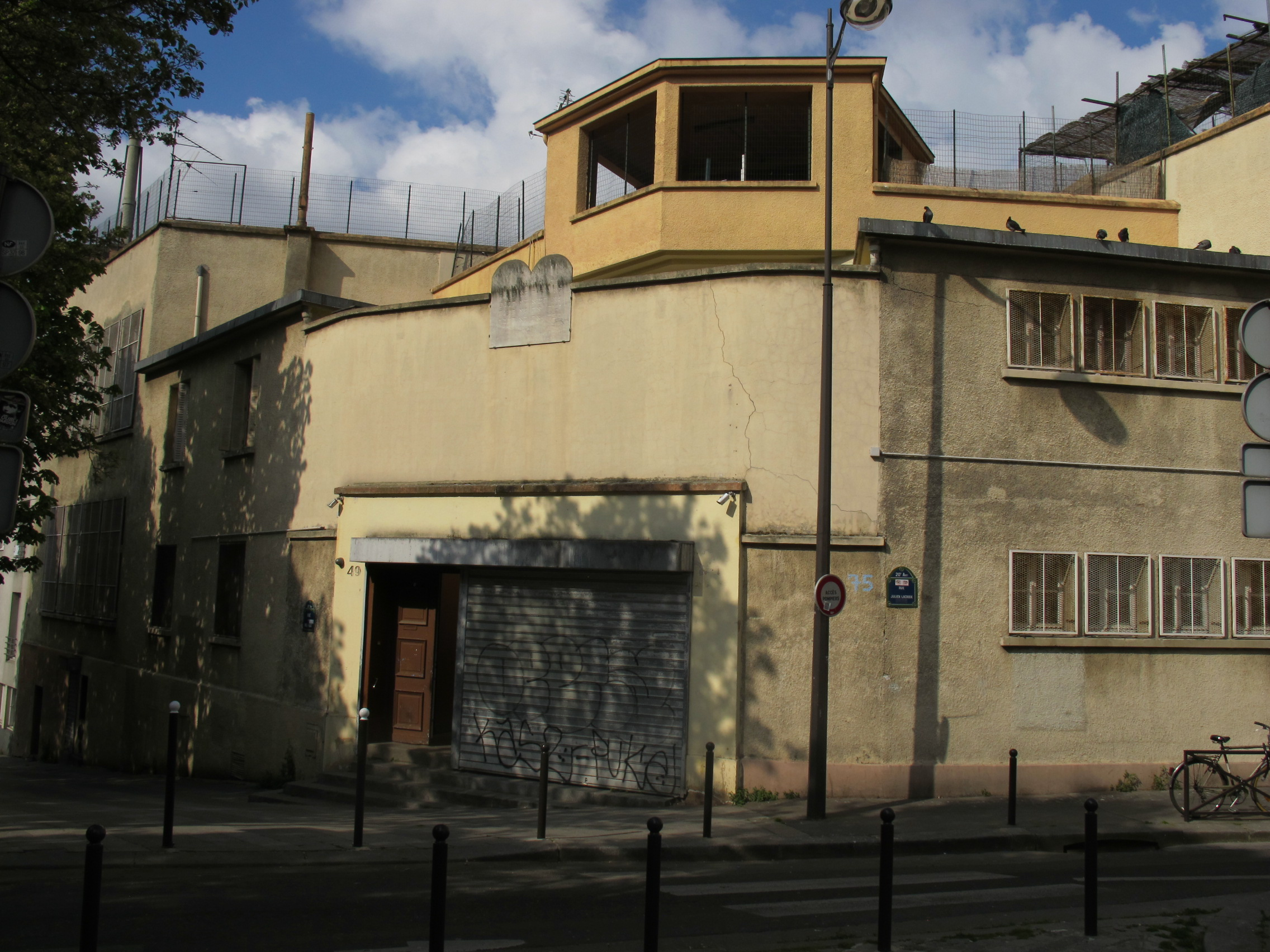 Synagogue Belleville, Paris